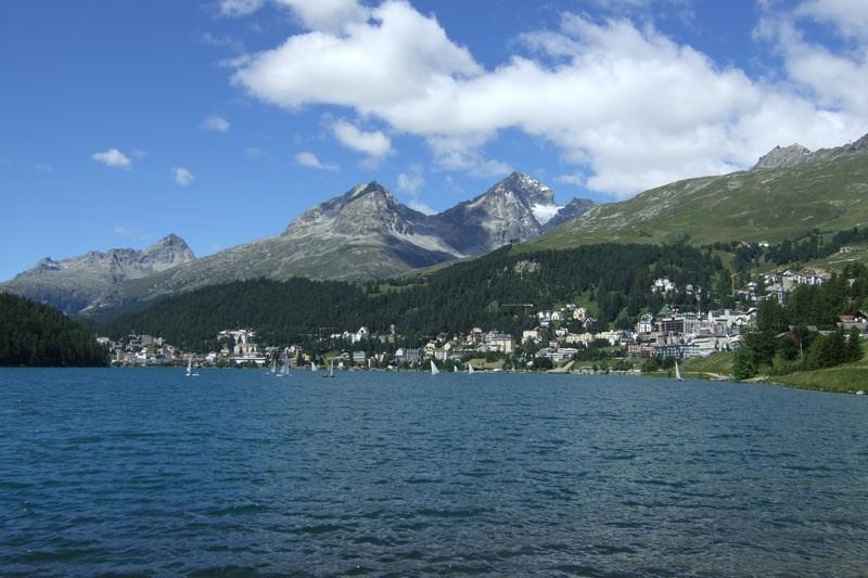 St. Moritz